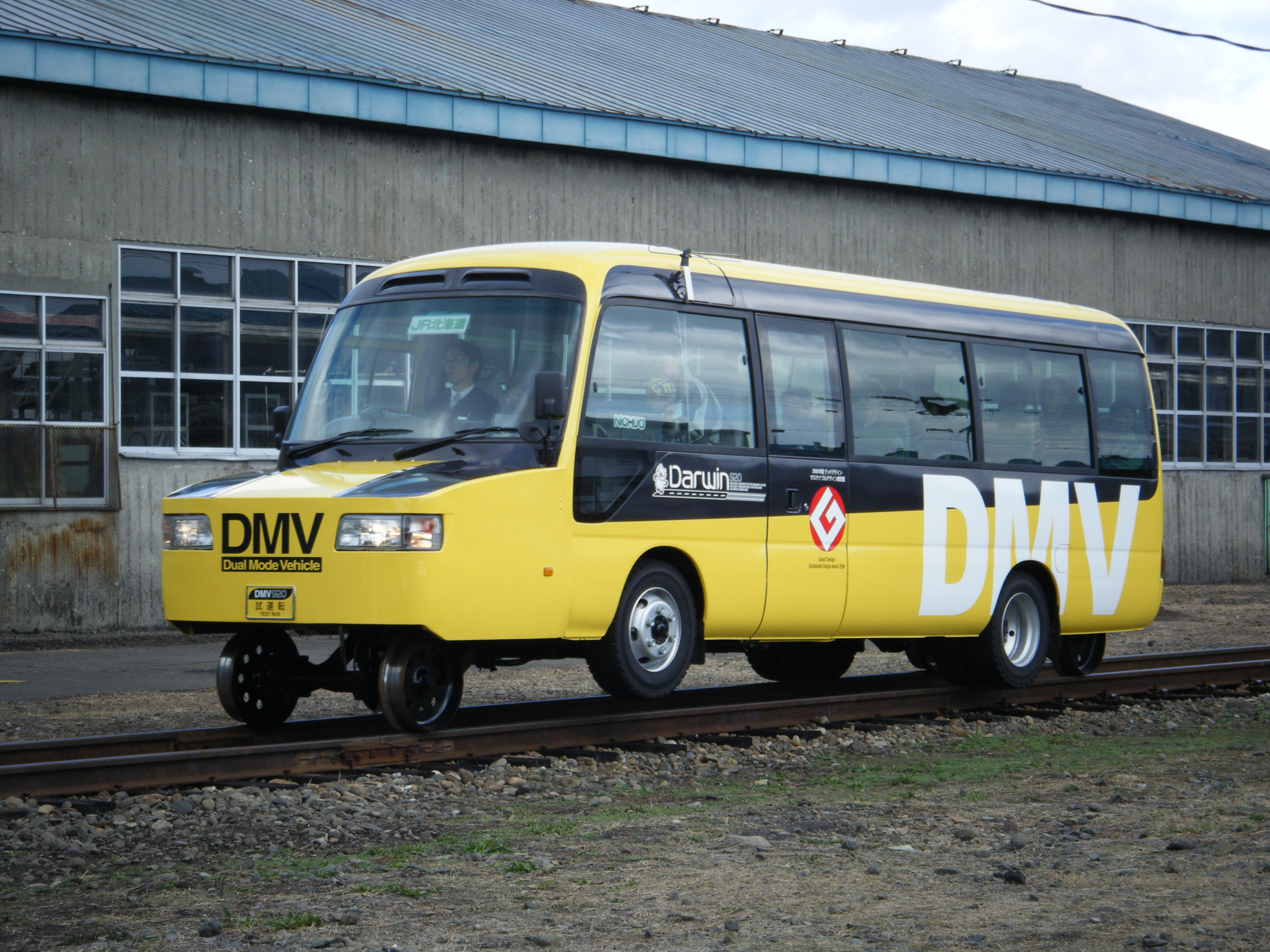 JR北海道 デュアル・モード・ビークル（苗穂工場一般公開時に撮影）